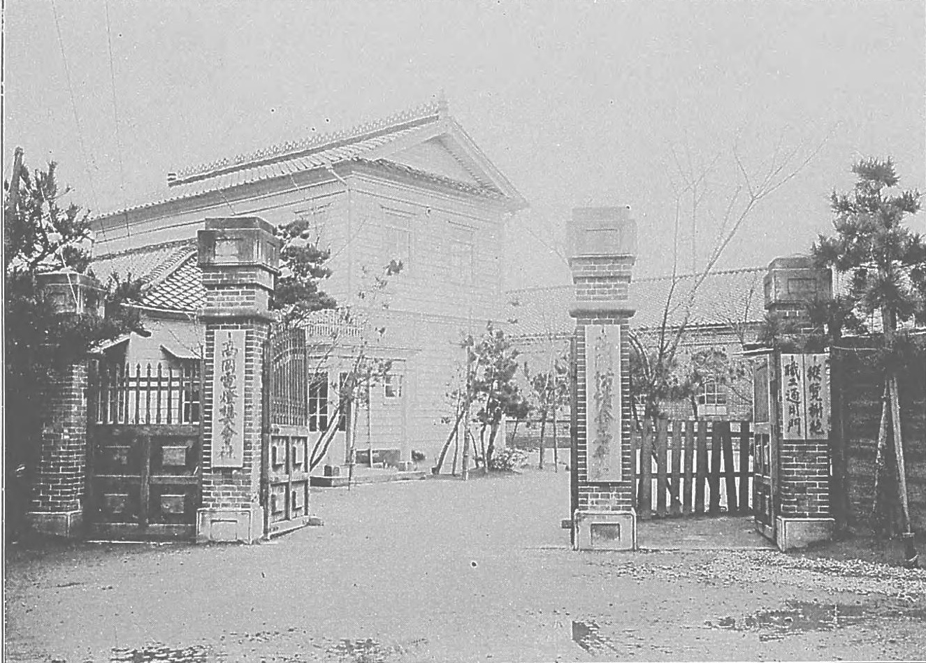 説明文に「射水郡横田村に在り資本金十万円にして錘数一万九百余を有し日日三百六十余名の職工及び徒弟を使役し一年凡そ七千七百梱を産出す」とあり。